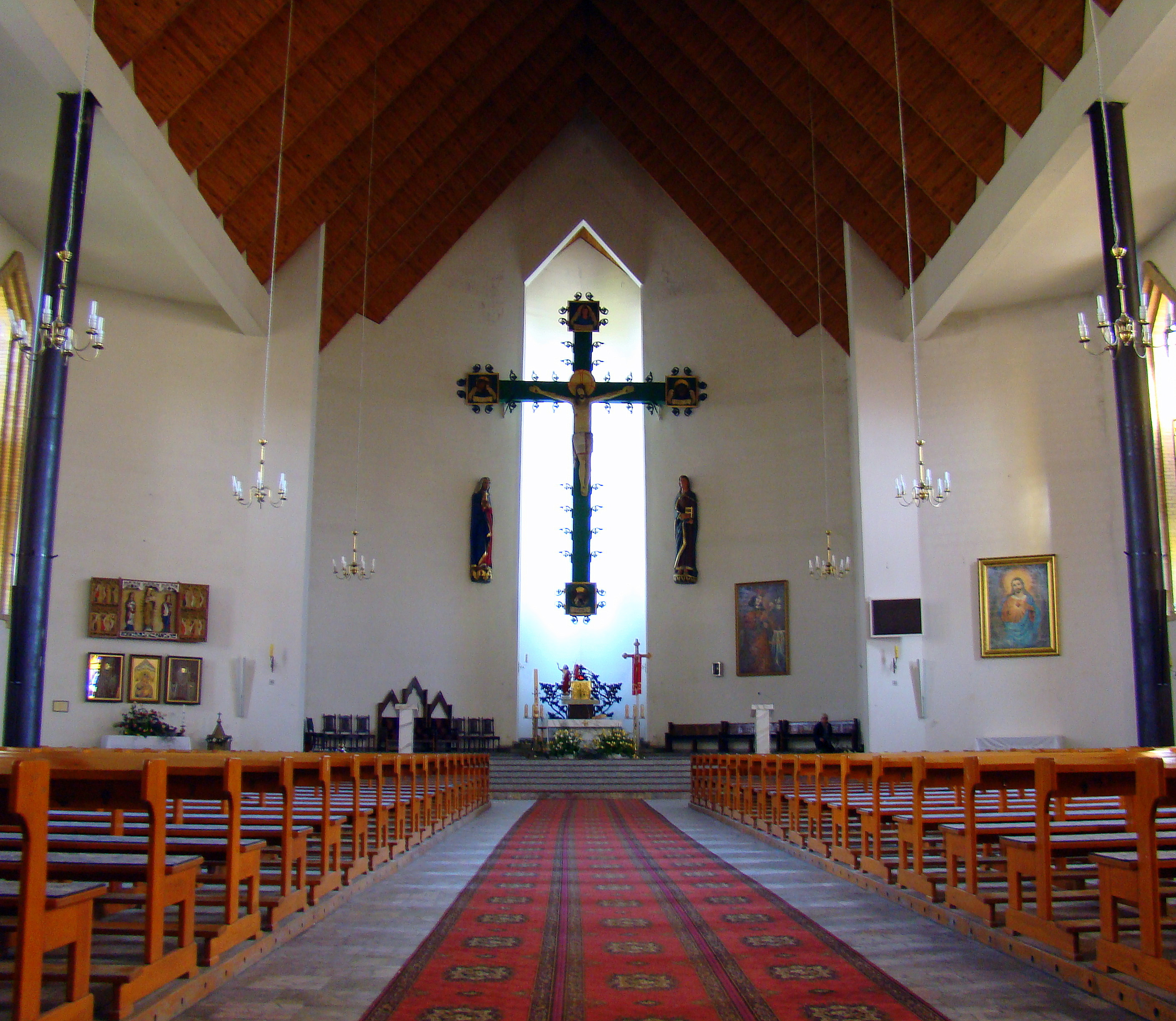 Kościół pw. św Kazimierza Królewicza w Policach (wnętrze), Polska